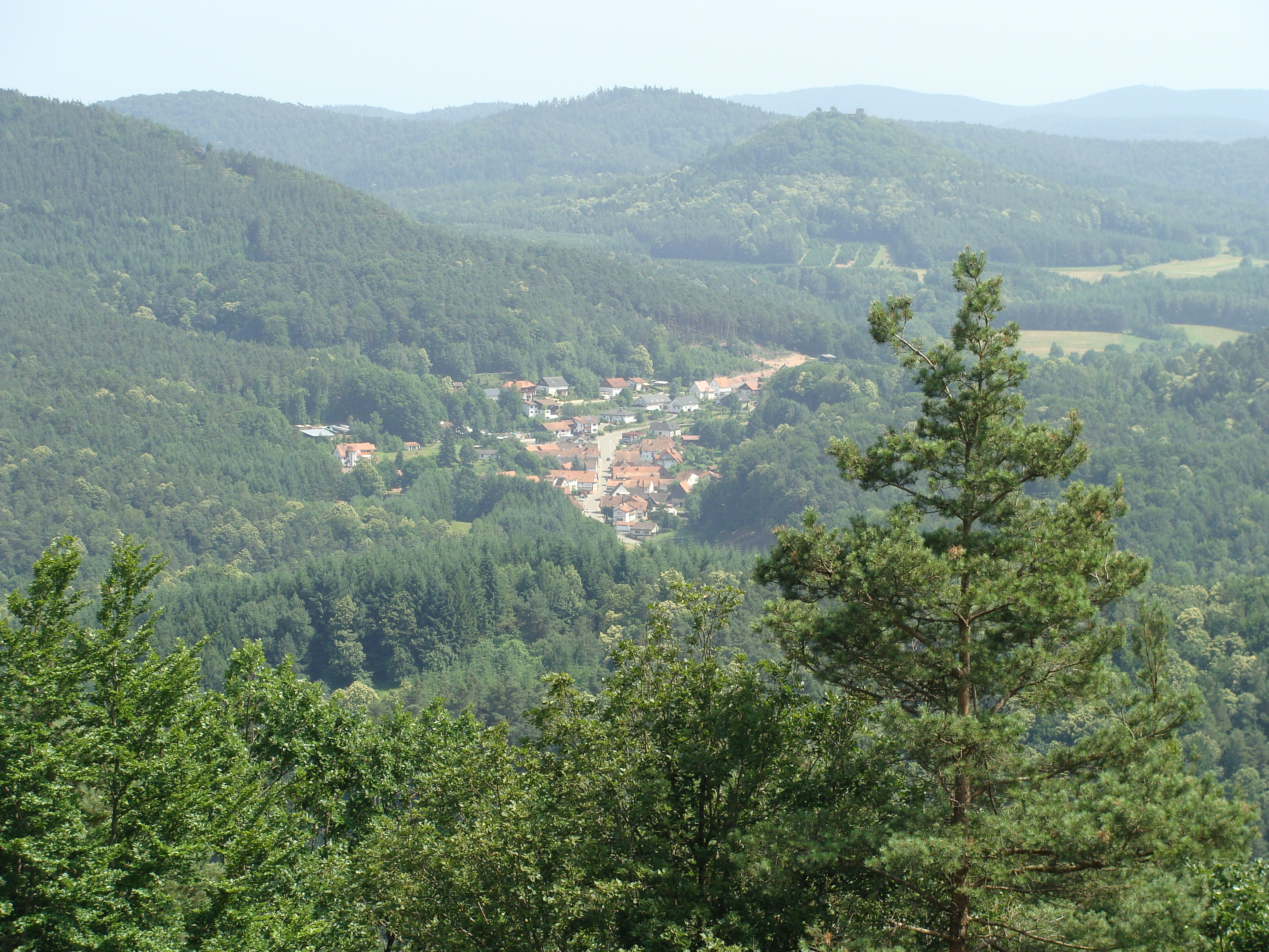 Darstein im Wasgau (Pfälzerwald) _ Blick vom Hahnenstein